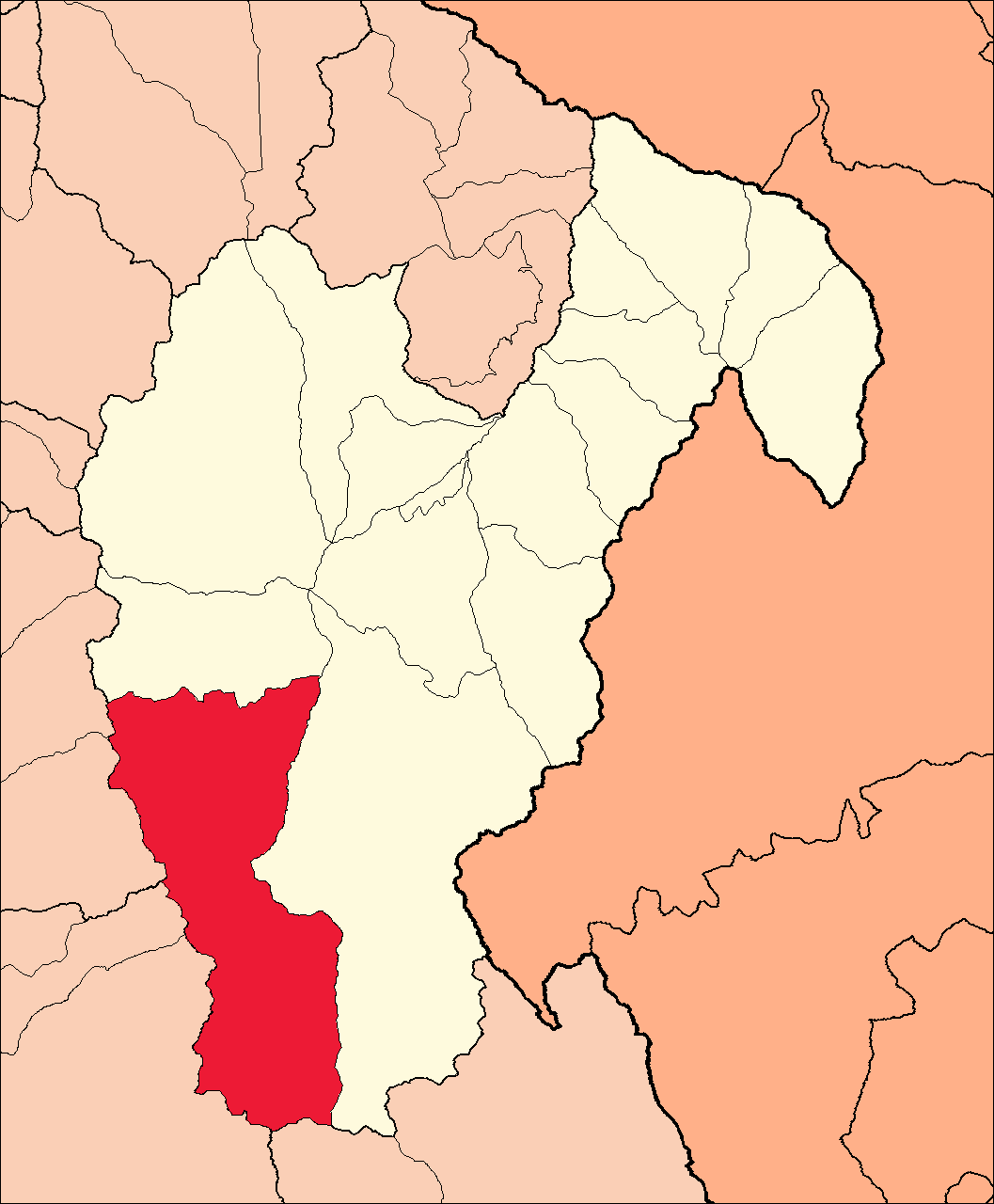 Área del distrito de Chavín de Huántar dentro de la provincia de Huari.